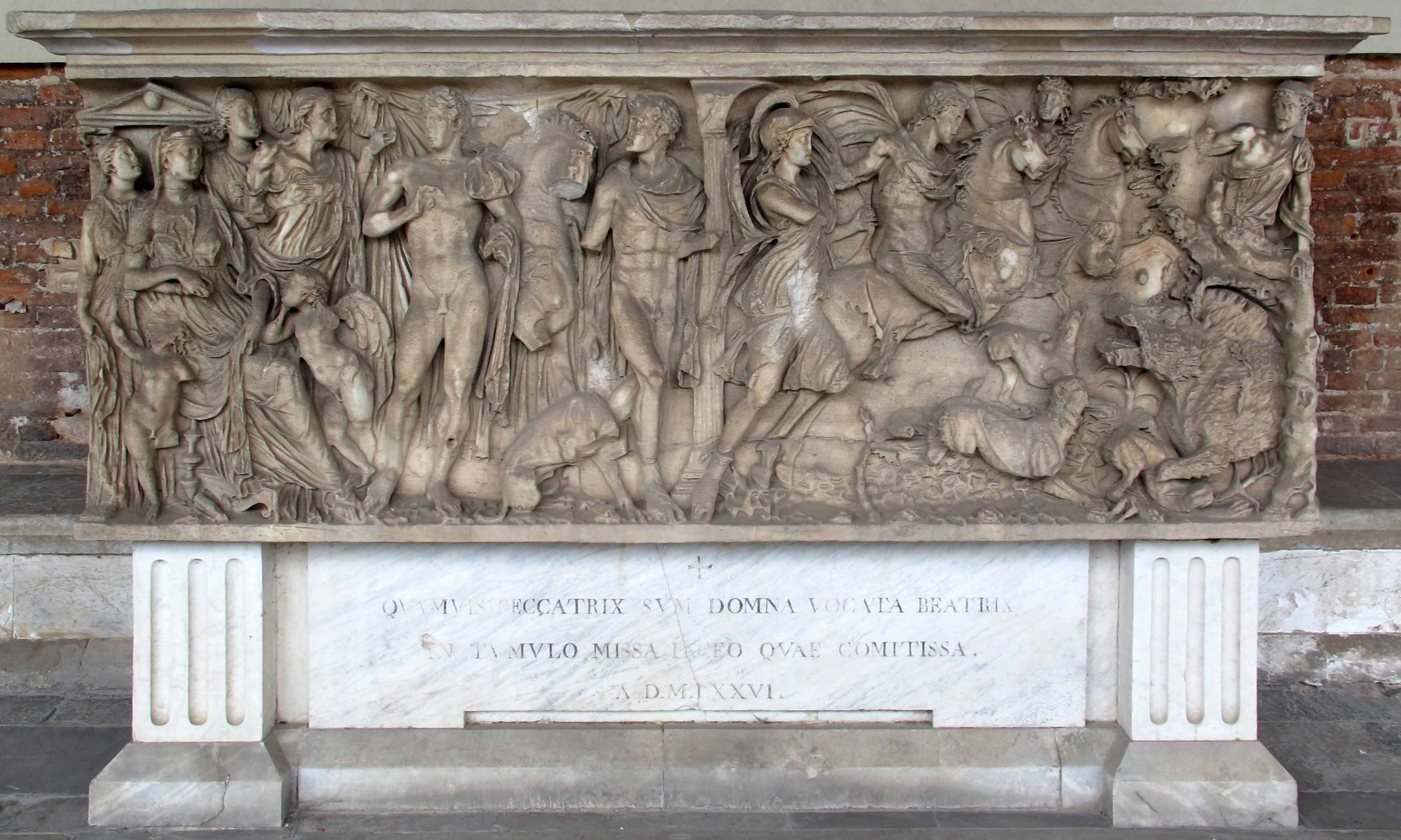 Sarcofago 13 di fedra e ippolito riutilizzato per beatrice di lotaringia (fine II sec.)